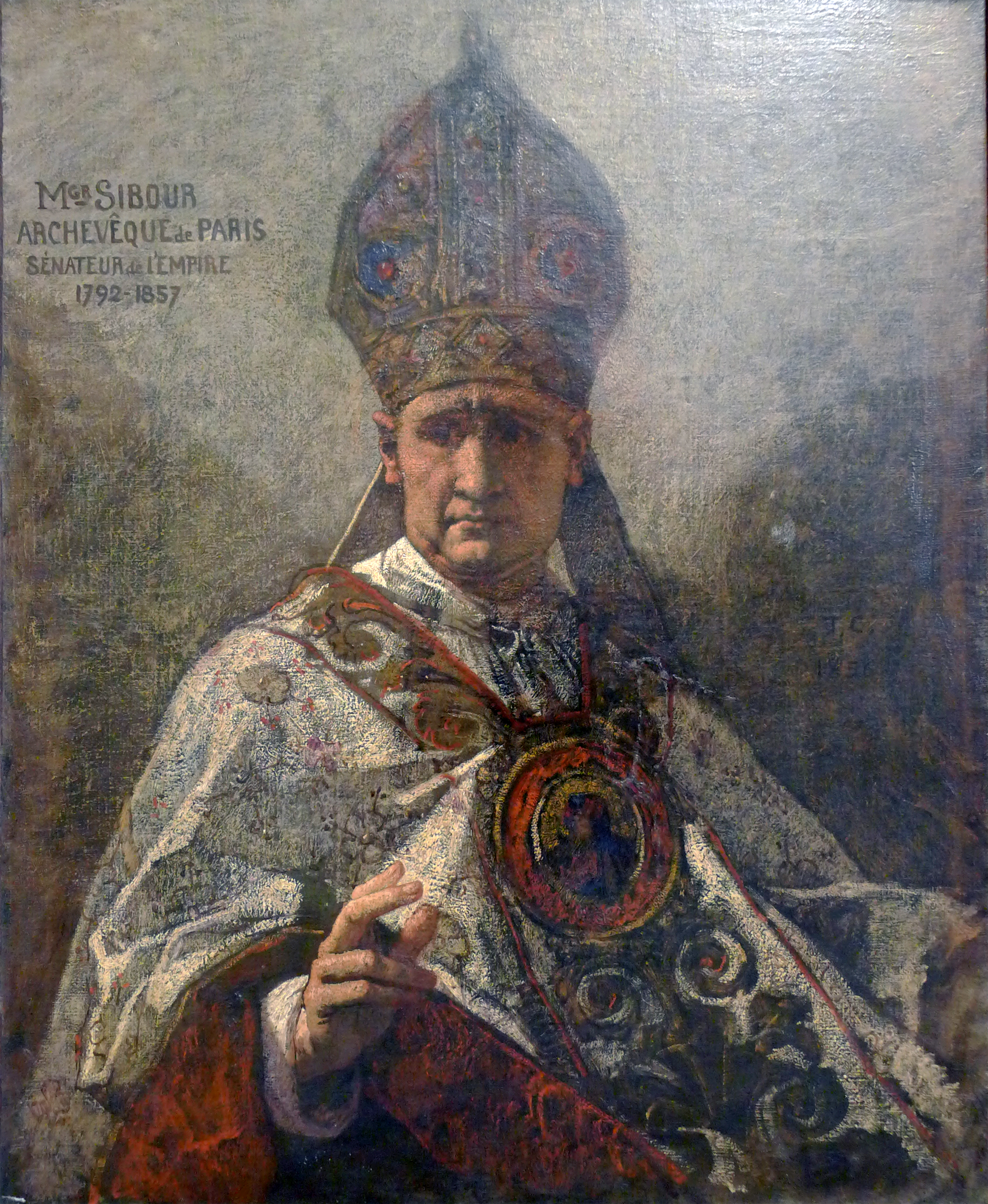 Connu pour ses idées libérales, Mgr Sibour fut appelé au siège archiepiscopal de Paris en 1848. Il se rallia cependant à Napoléon III et en fut récompensé en étant nommé sénateur. Il fut poignardé, le 3 janvier 1857, par un prêtre interdit dans l’église de Saint-Etienne-du-Mont.